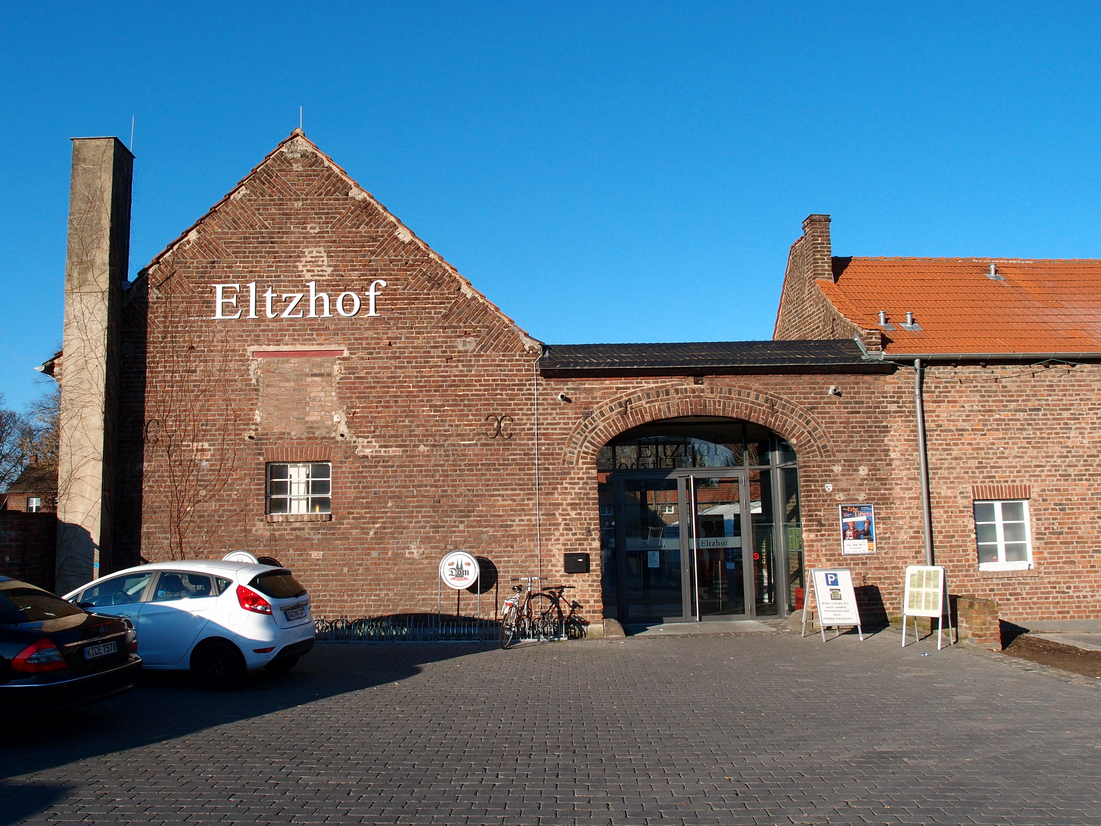 Historischer Eltzhof in Köln-Wahn (Teilansicht / Haupteingang) Datum: 13.01.2013 Urheber: M. Pfeiffer alias Gordito1869 Quelle: Privates Fotoarchiv des Urhebers